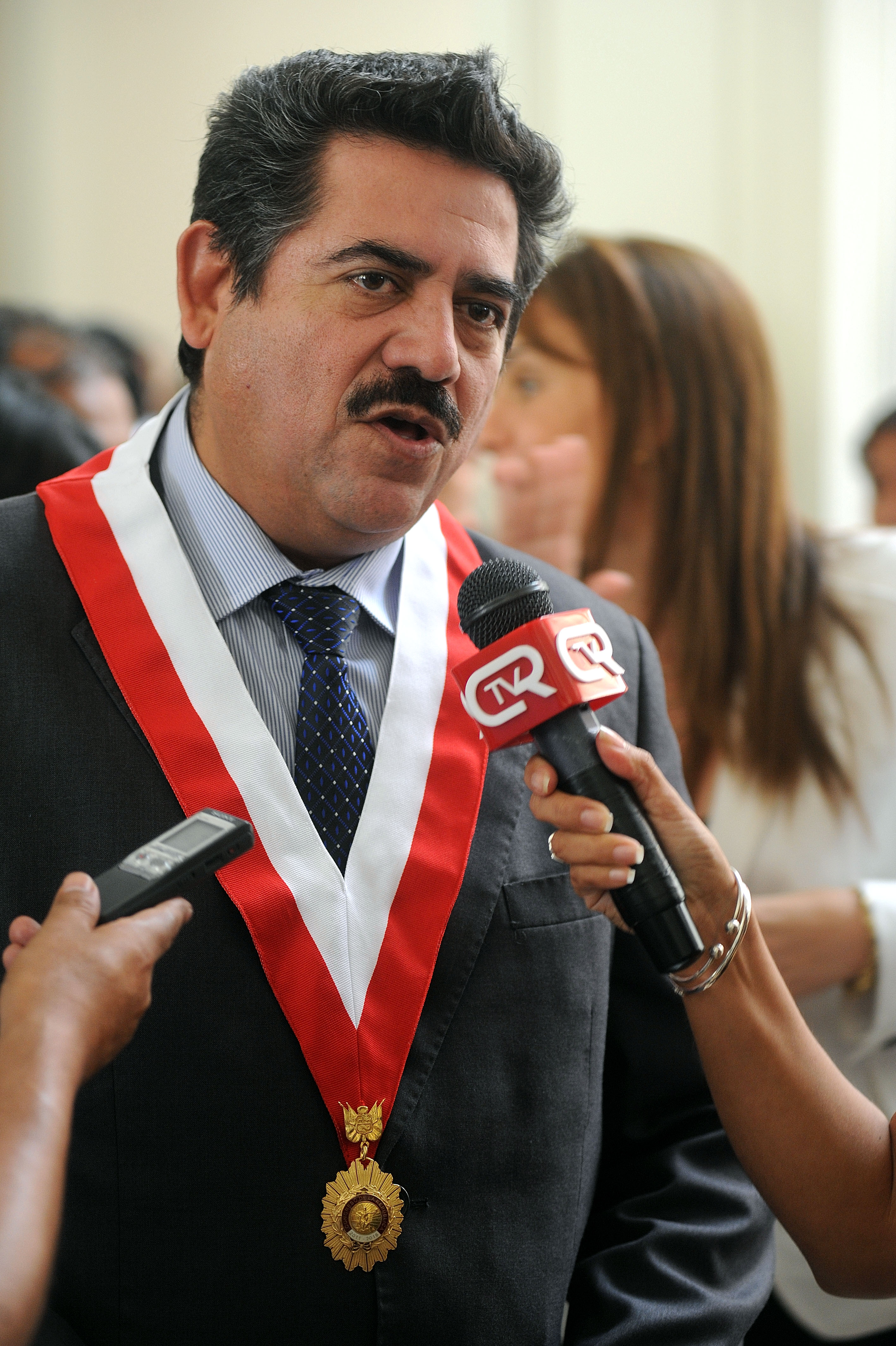 Manuel Merino De Lama, primer vicepresidente del Parlamento participó en representación de la Mesa Directiva del Congreso, en los actos conmemorativos por el 477 aniversario de la fundación de la ciudad de Lima, destacando la necesidad de trabajar de manera conjunta todos los poderes del Estado y autoridades para hacer de Lima una ciudad cálida y segura.